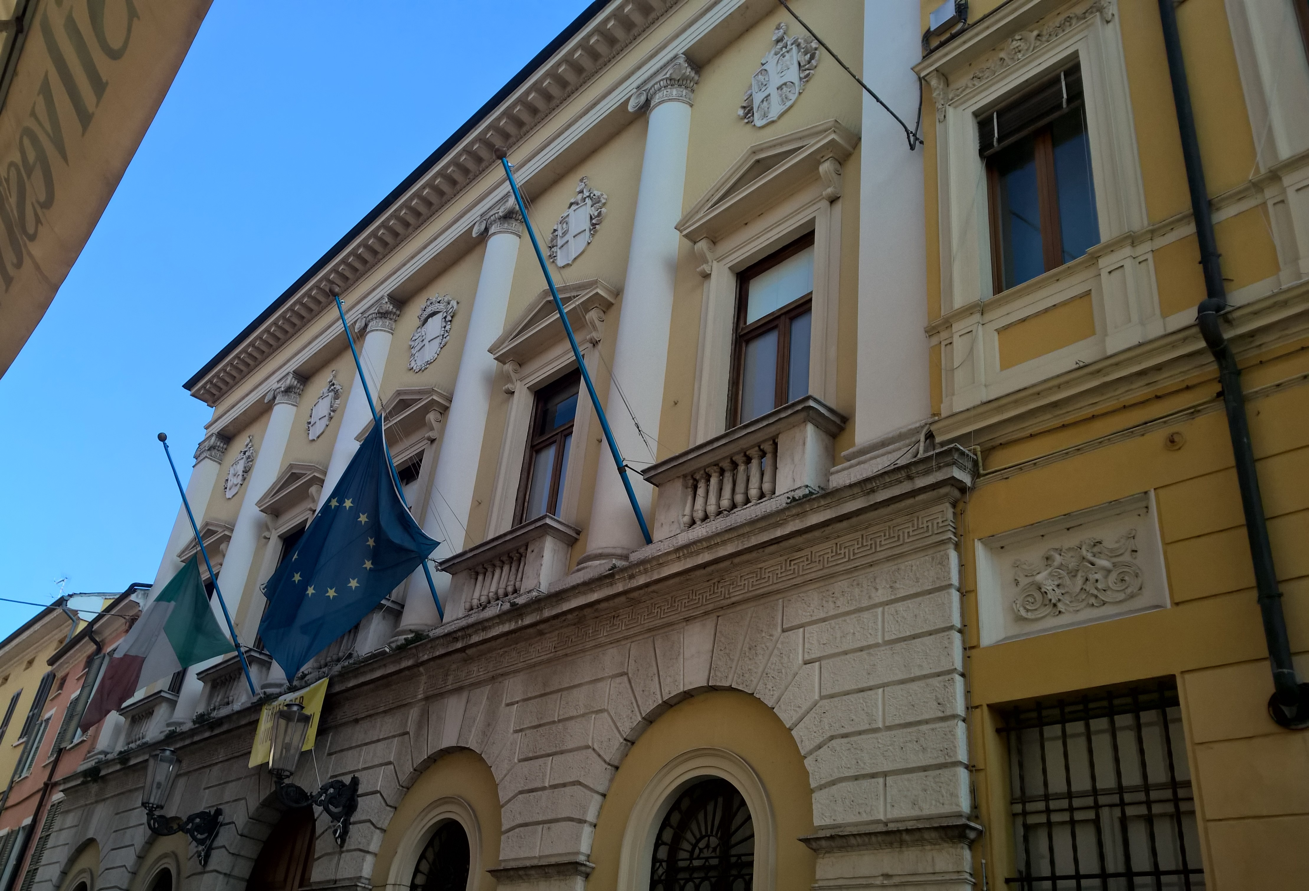 Facciata del Palazzo Municipale di Mantova.